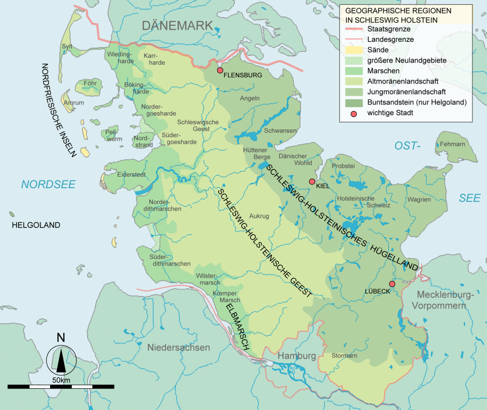 Landscapes in Schleswig-Holstein, Germany